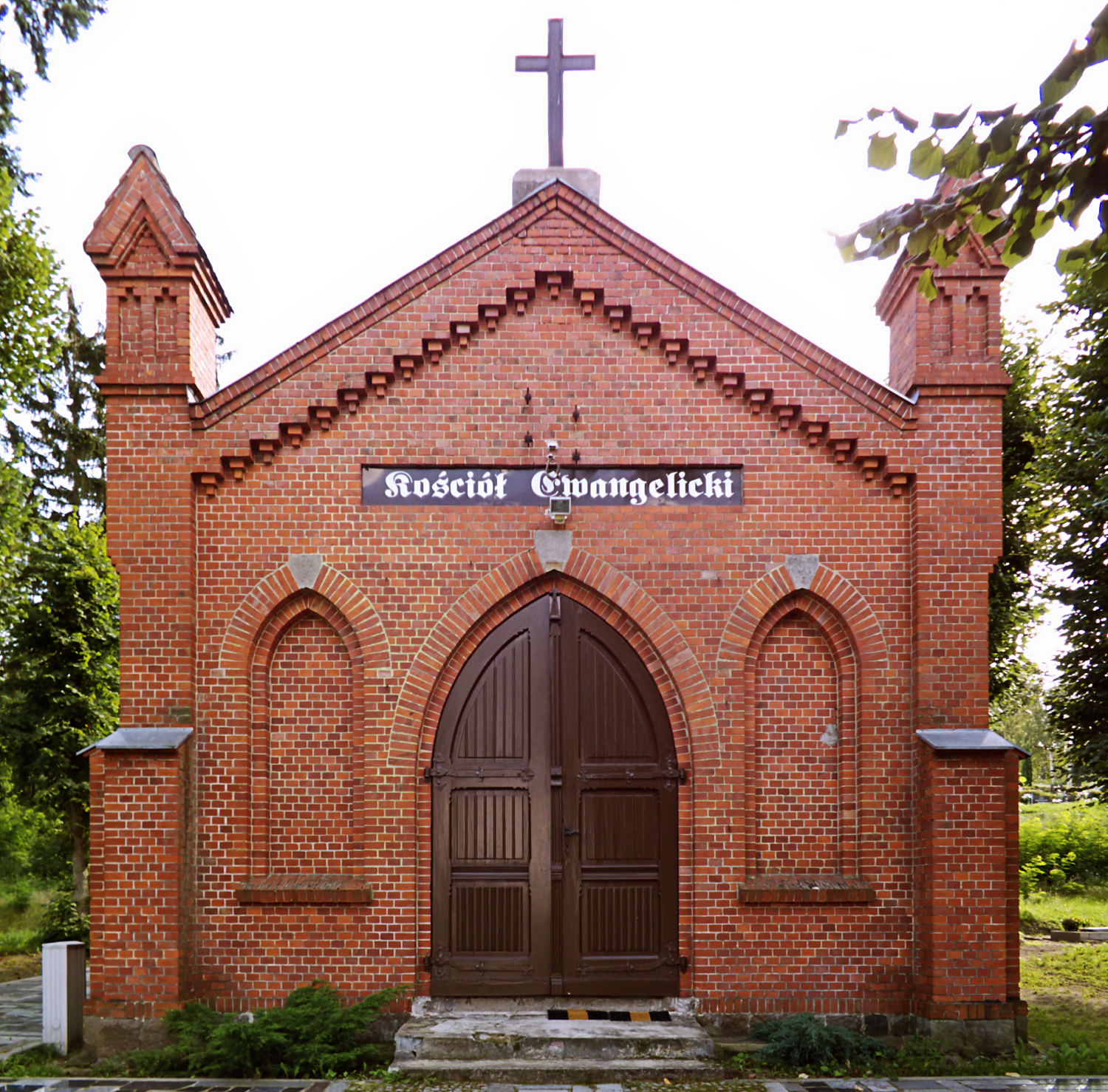 Chodzież, cmentarz ewangelicki, kaplica cmentarna